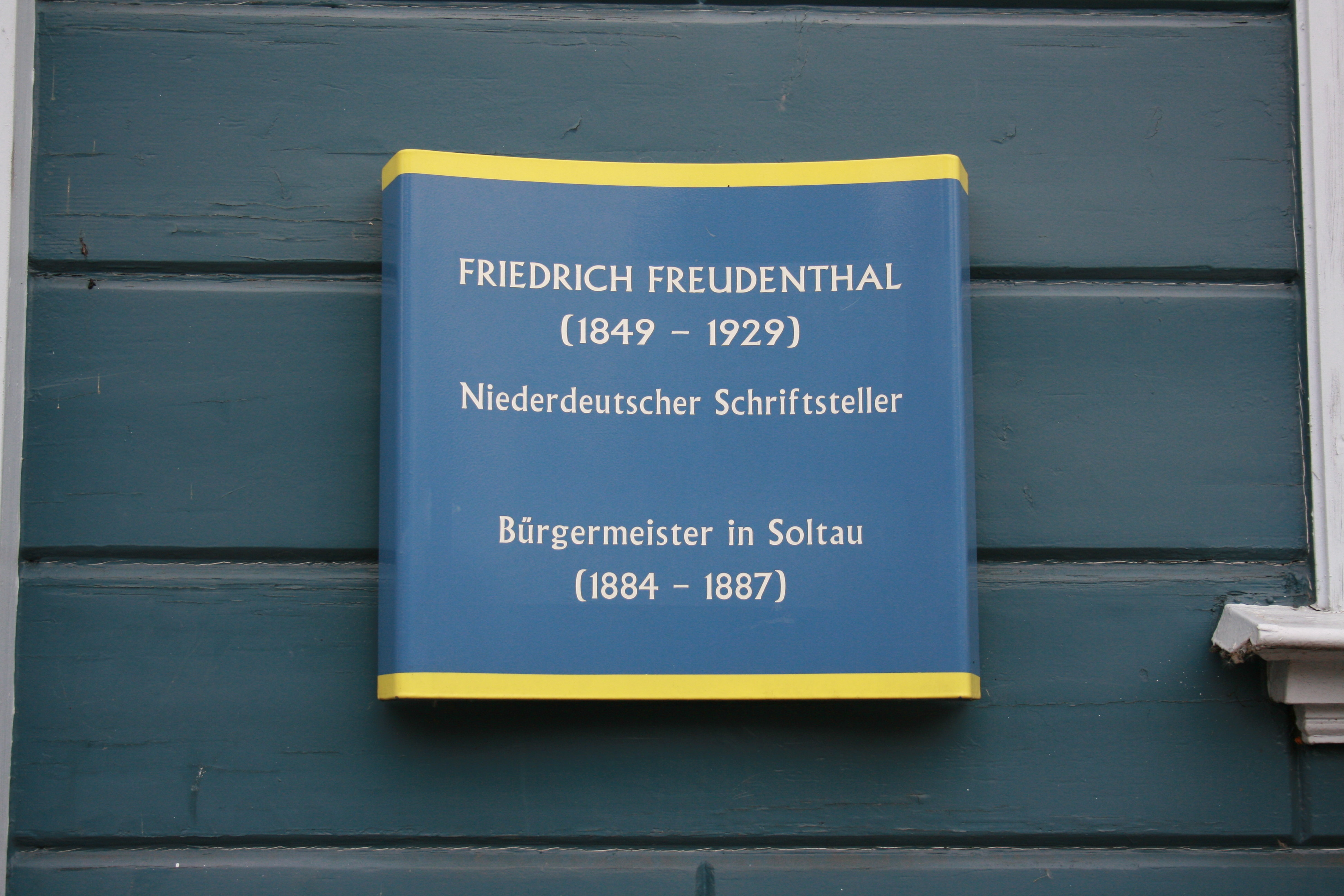 Altes Rathaus an der Poststraße in Soltau